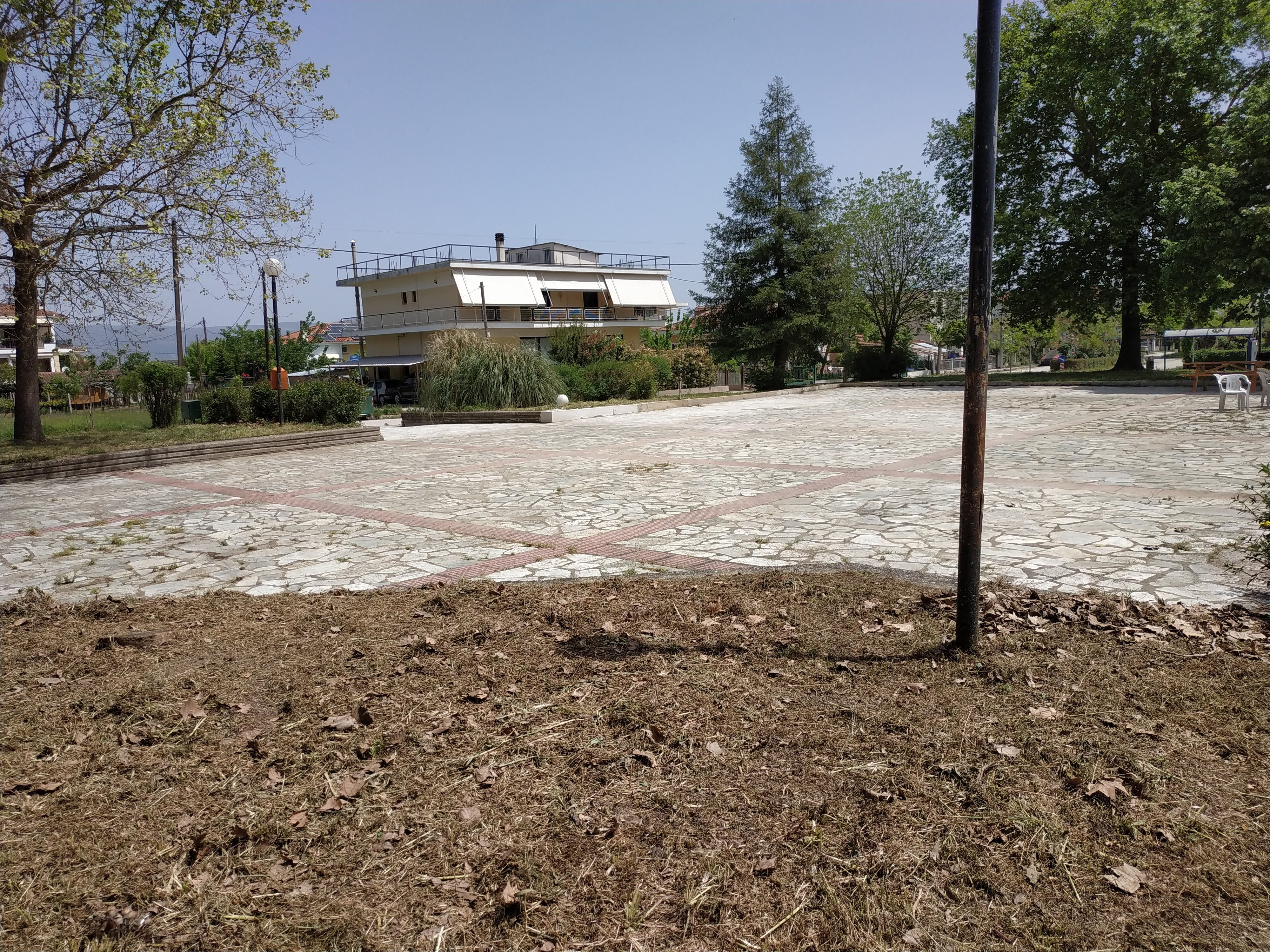 Πλατεία Λογγάκι